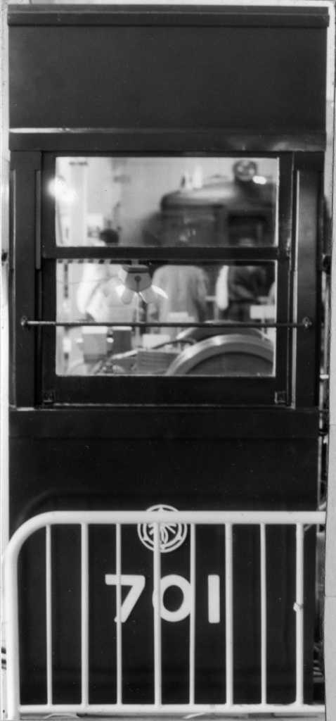 保存された701の2段窓